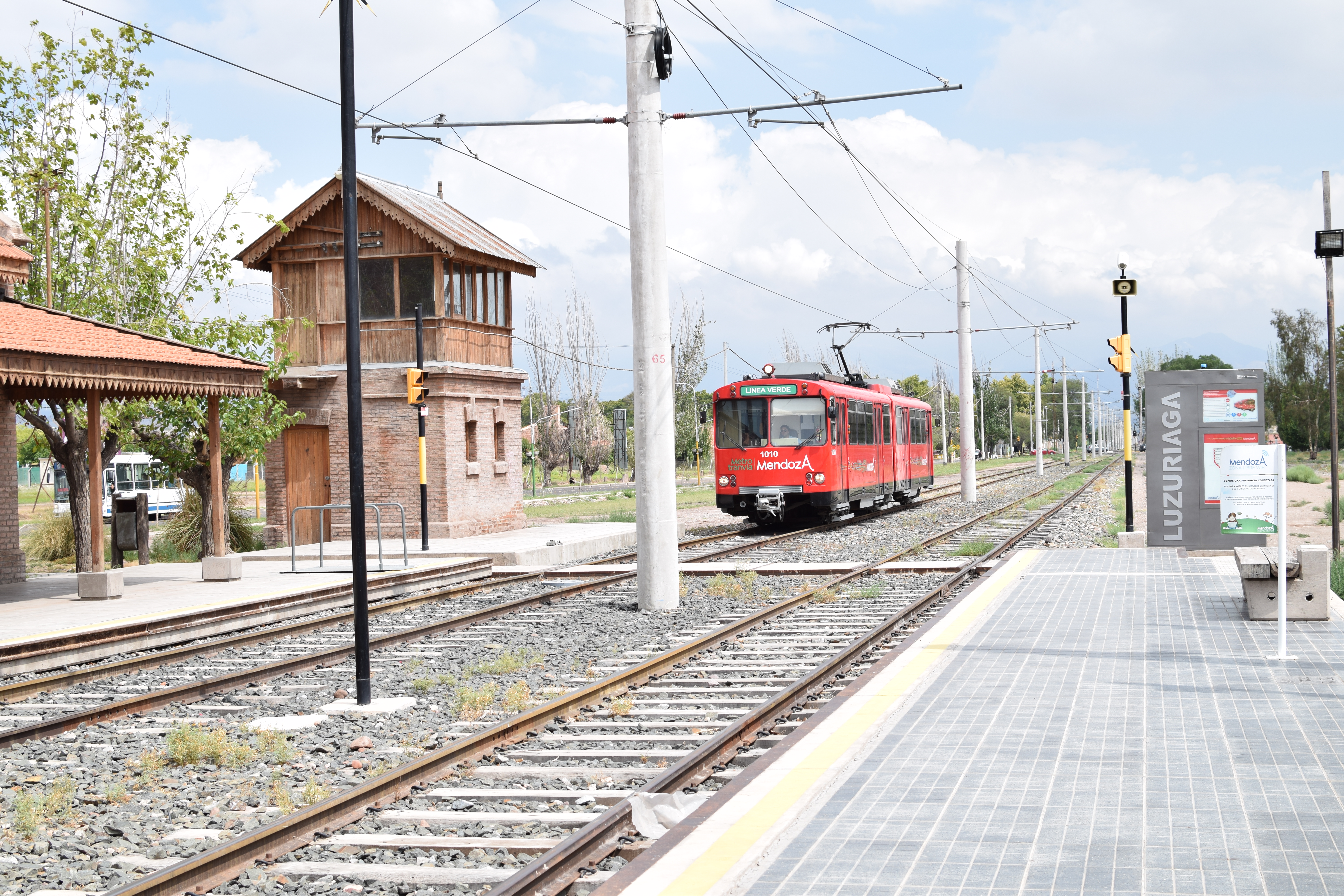 Dupla Siemens–Duewag U2 en el Parador Luzuriaga rumbo a Gutierrez.